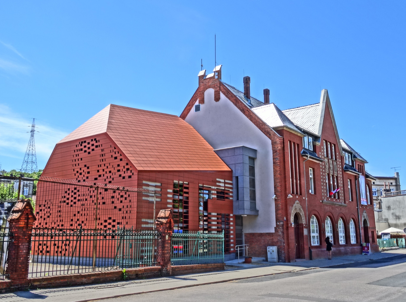 Budynek dawnej ochronki dla dzieci, zbud. 1908-1909, ob. siedziba Wojewódzkiego Ośrodka Kultury "Stara Ochronka" w Bydgoszczy pl. Kościeleckich 6